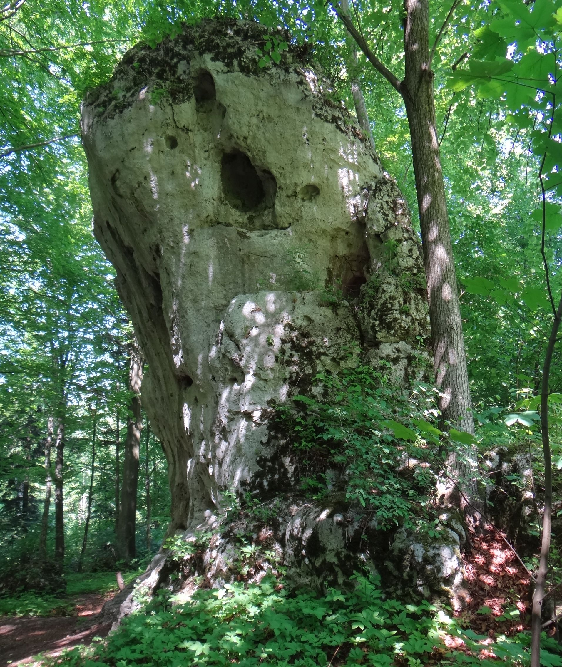 Skała Szczurek